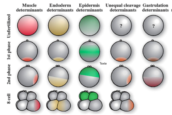 déterminantscyto